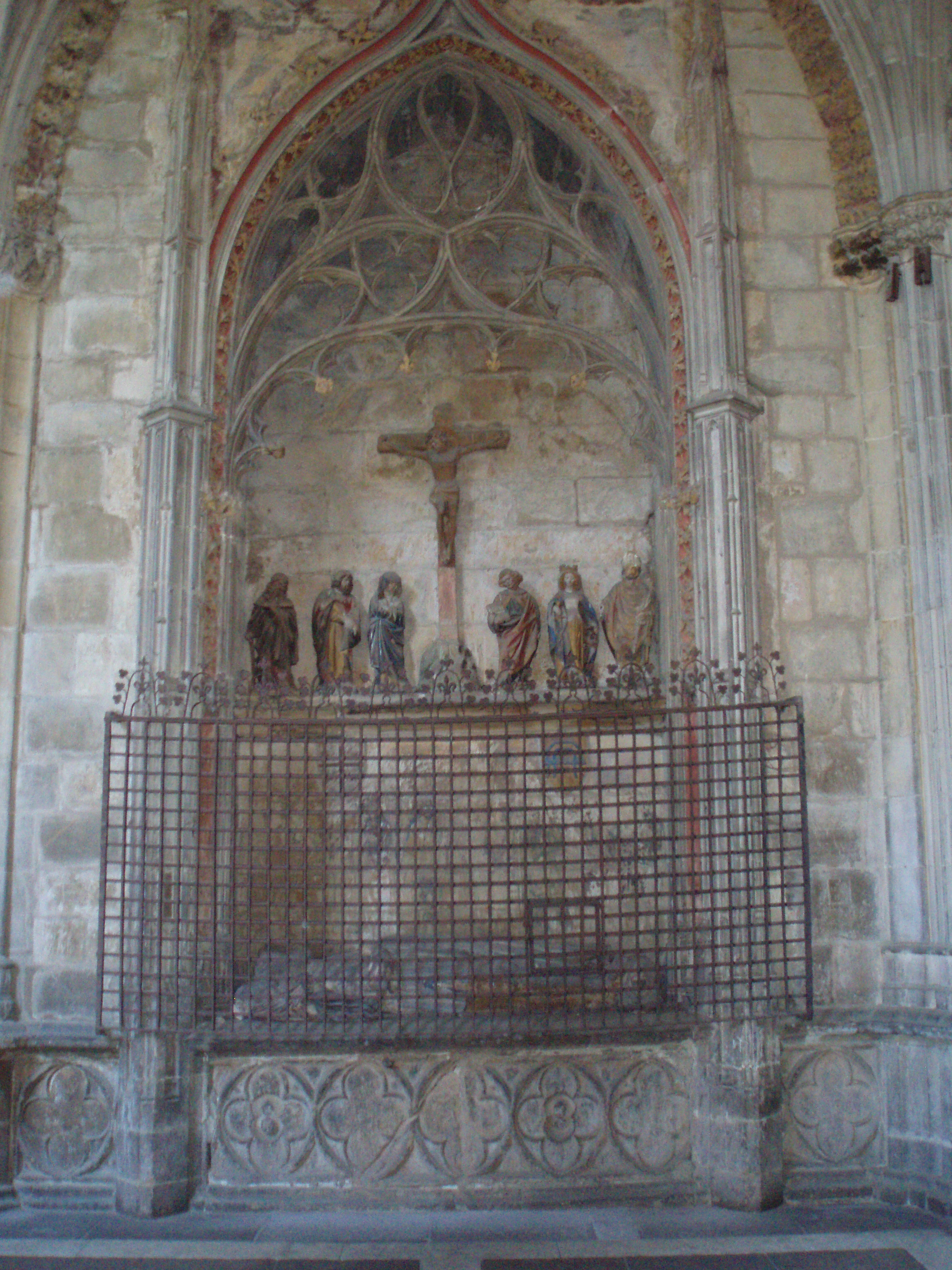 Sepulcro de los Garro, vizcondes de Zolina. Claustro de la Catedral de Pamplona. Navarra, (España).